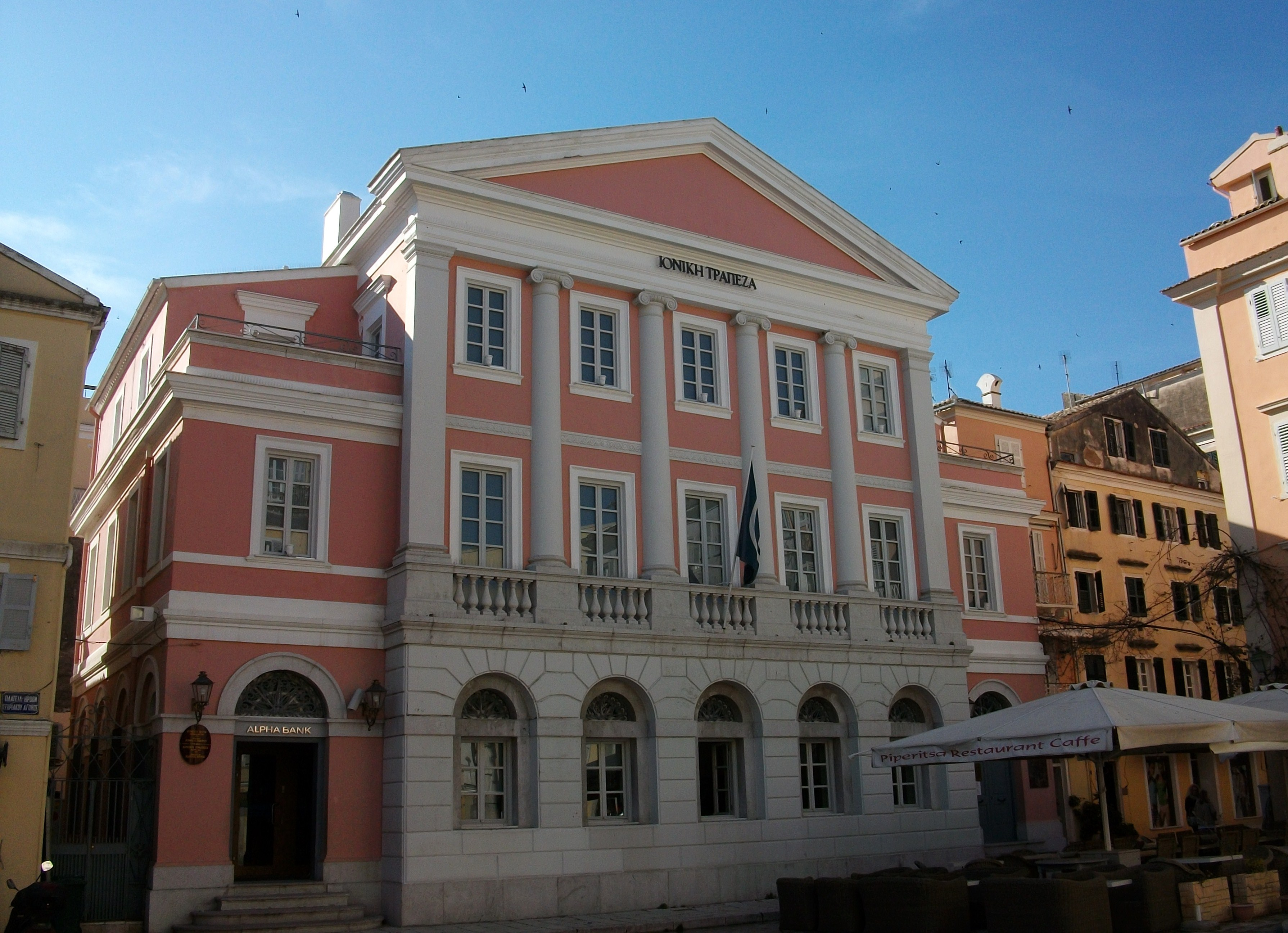 Museu del Paper Moneda, Corfú.